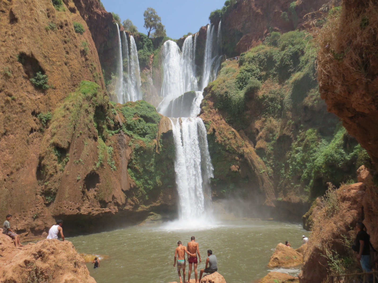 Ouzoud Falls